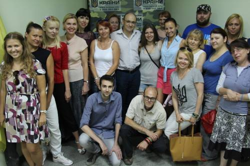 Зустріч Голови правління "Фонду оборони країни" Павла Хазана з іспанським журналістом Хосе Хіменесом Гонсалесом та волонтерами, що чергують на залізничному вокзалі в "Місці для відпочинку бійців"